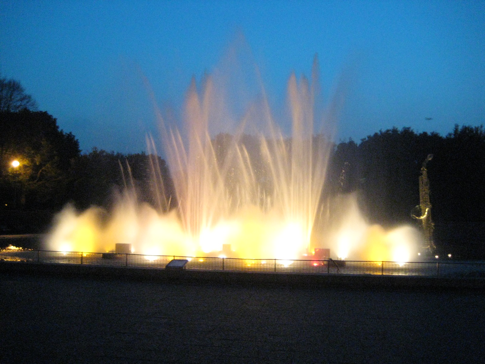 夜になり、ライトアップされた北浦和公園の音楽噴水。